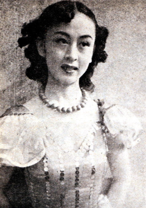 雪代敬子（1951年）